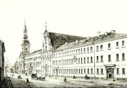 Kalisz, Kolegium Jezuickie, Korpus Kadetów